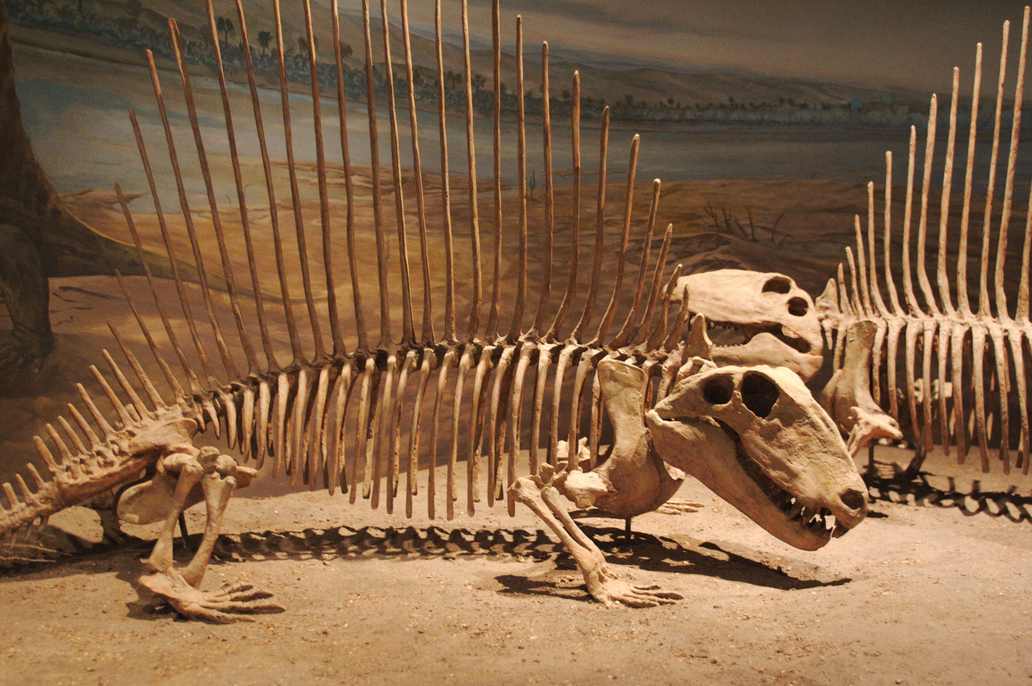 Dimetrodon fan spines